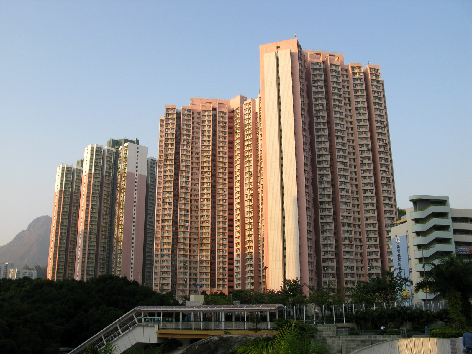 秀茂坪邨 Sau Mau Ping Estate